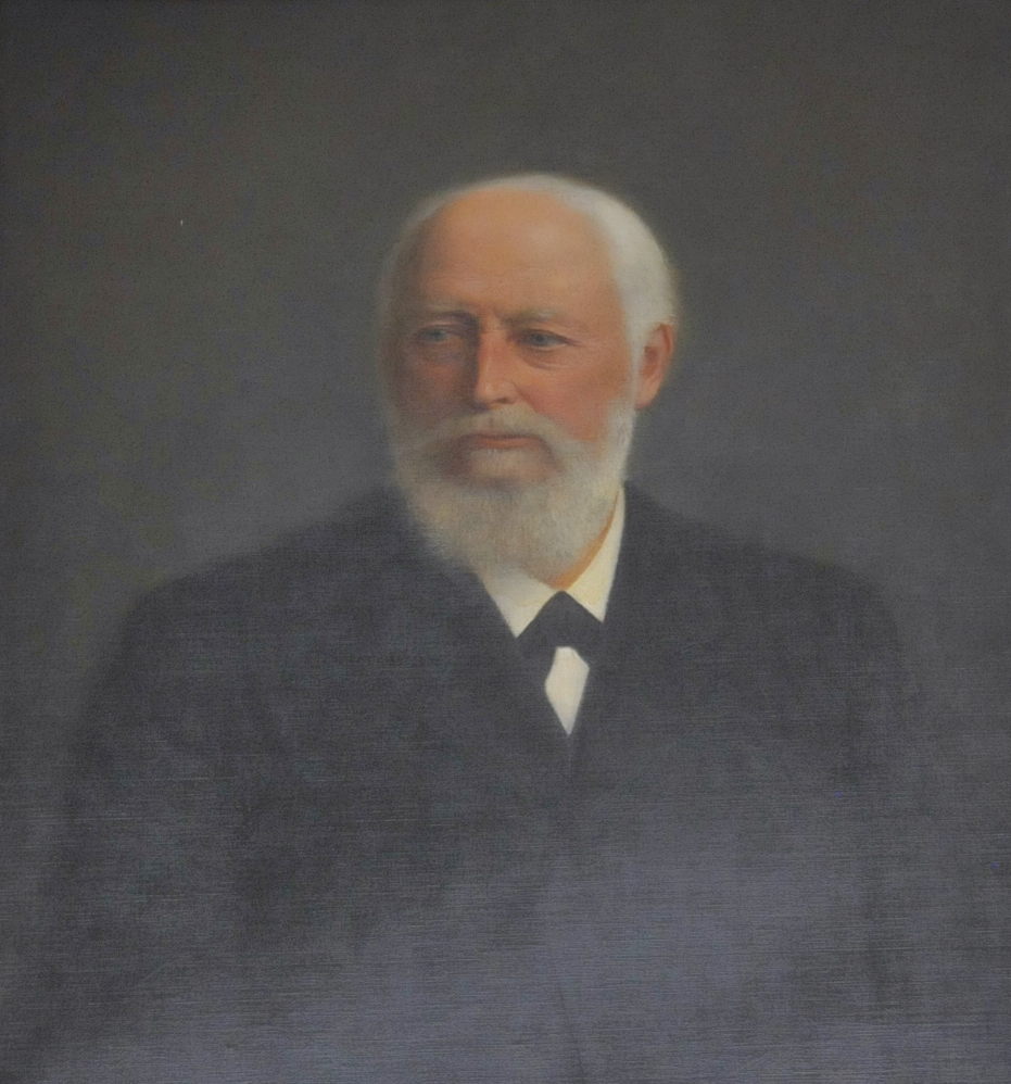 Arwed Emminghaus, Porträt im Deutschen Versicherungsmuseum